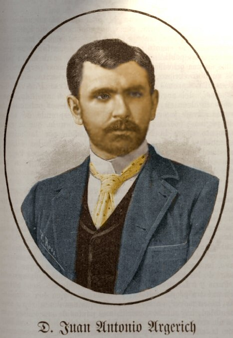 Juan Antonio Argerich c. 1888